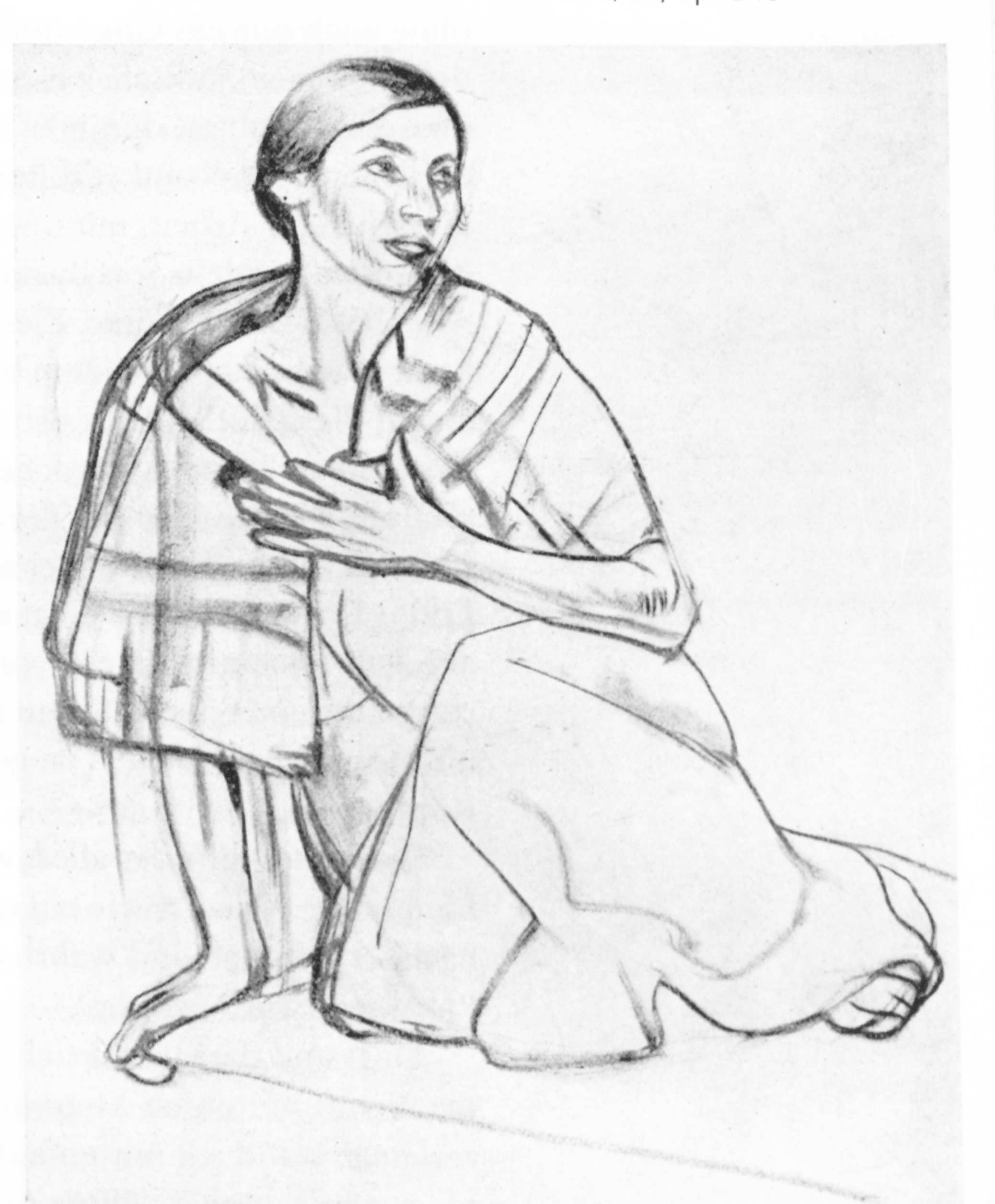 Henryk Glicenstein: Die Verlassene, in: Ost und West, 1917, Sp. 545